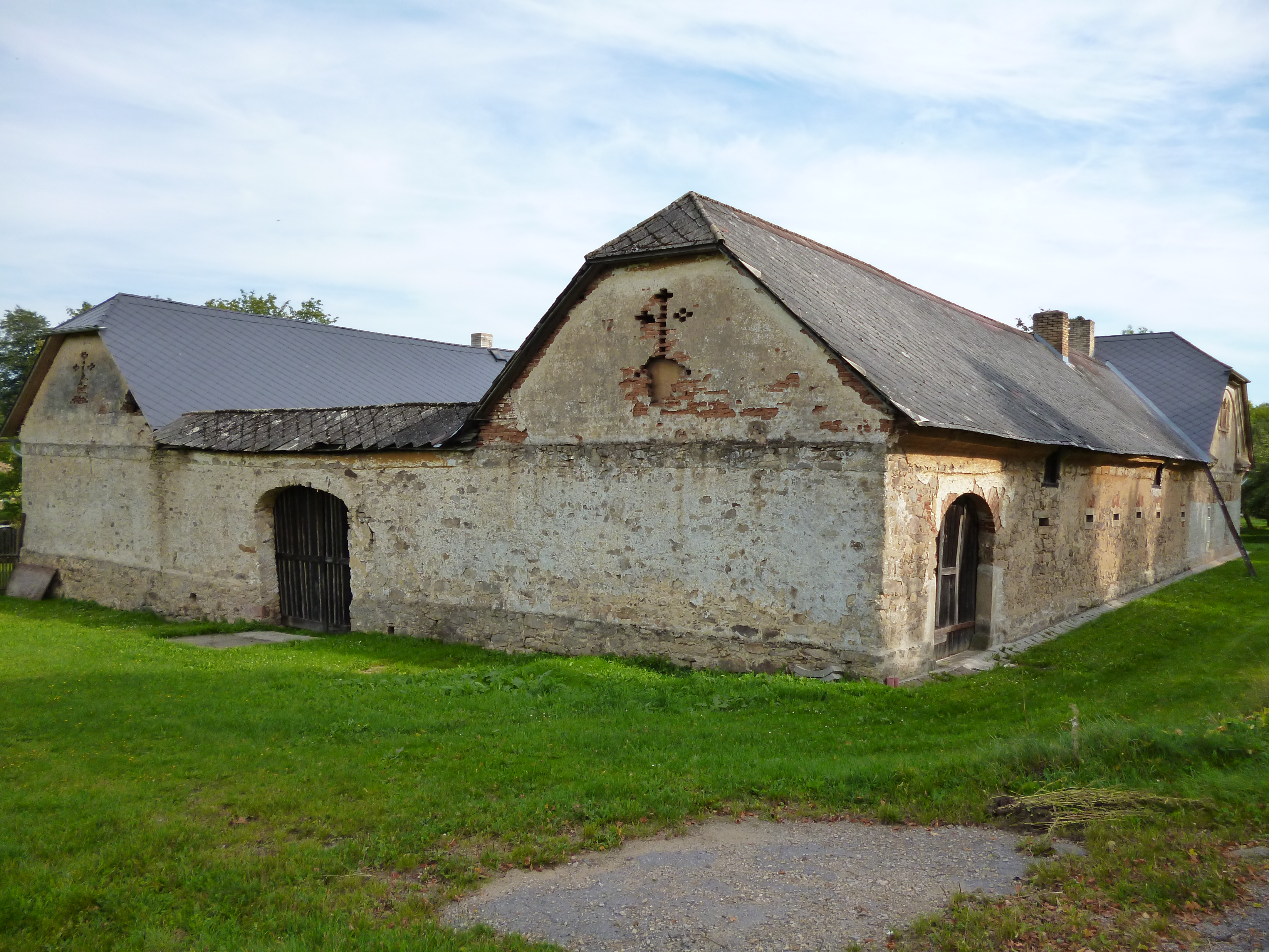 Dudín - zájezdní hostinec 1